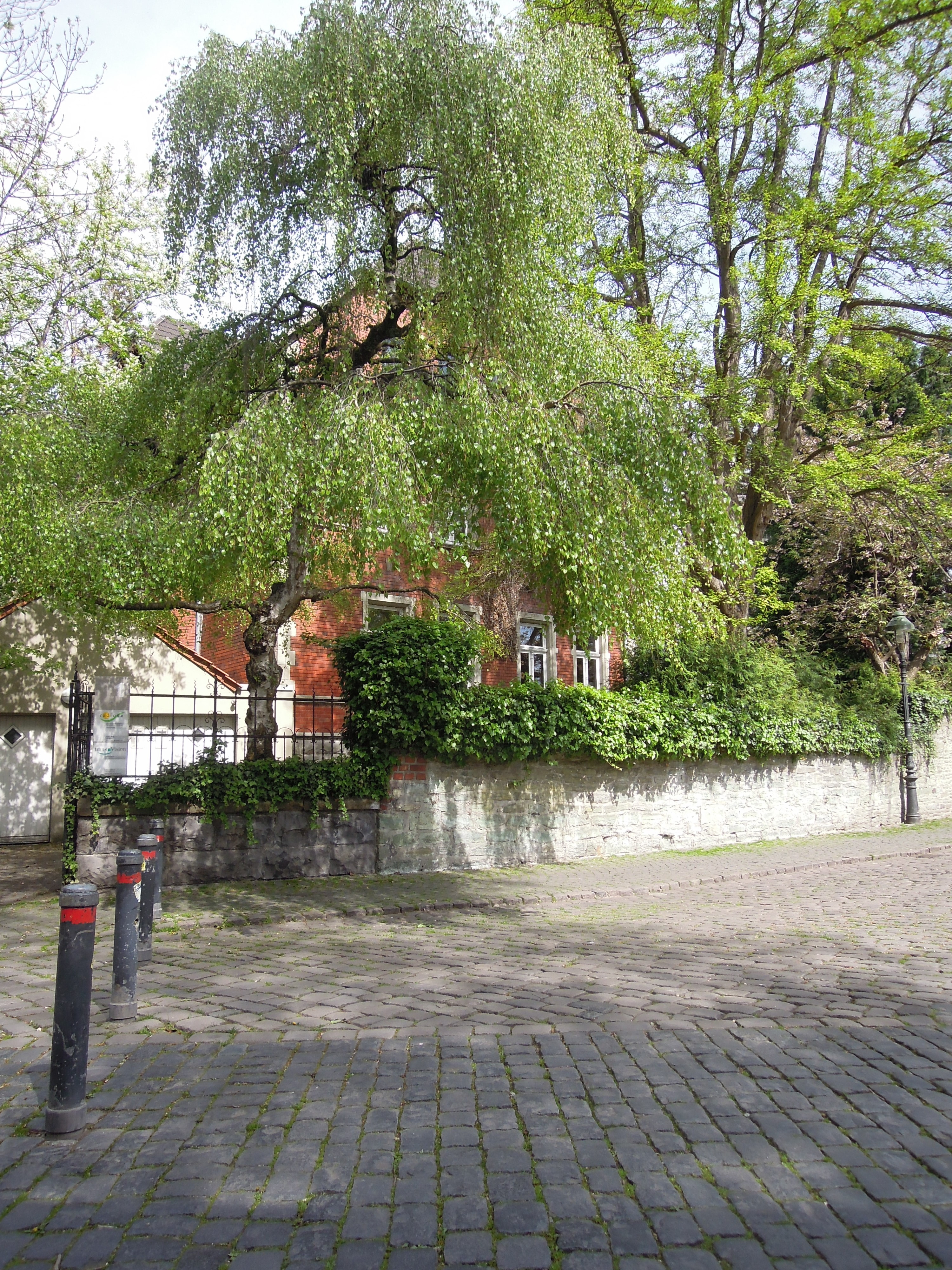 Stolpersteinlage Soest Teichmühlengasse 1